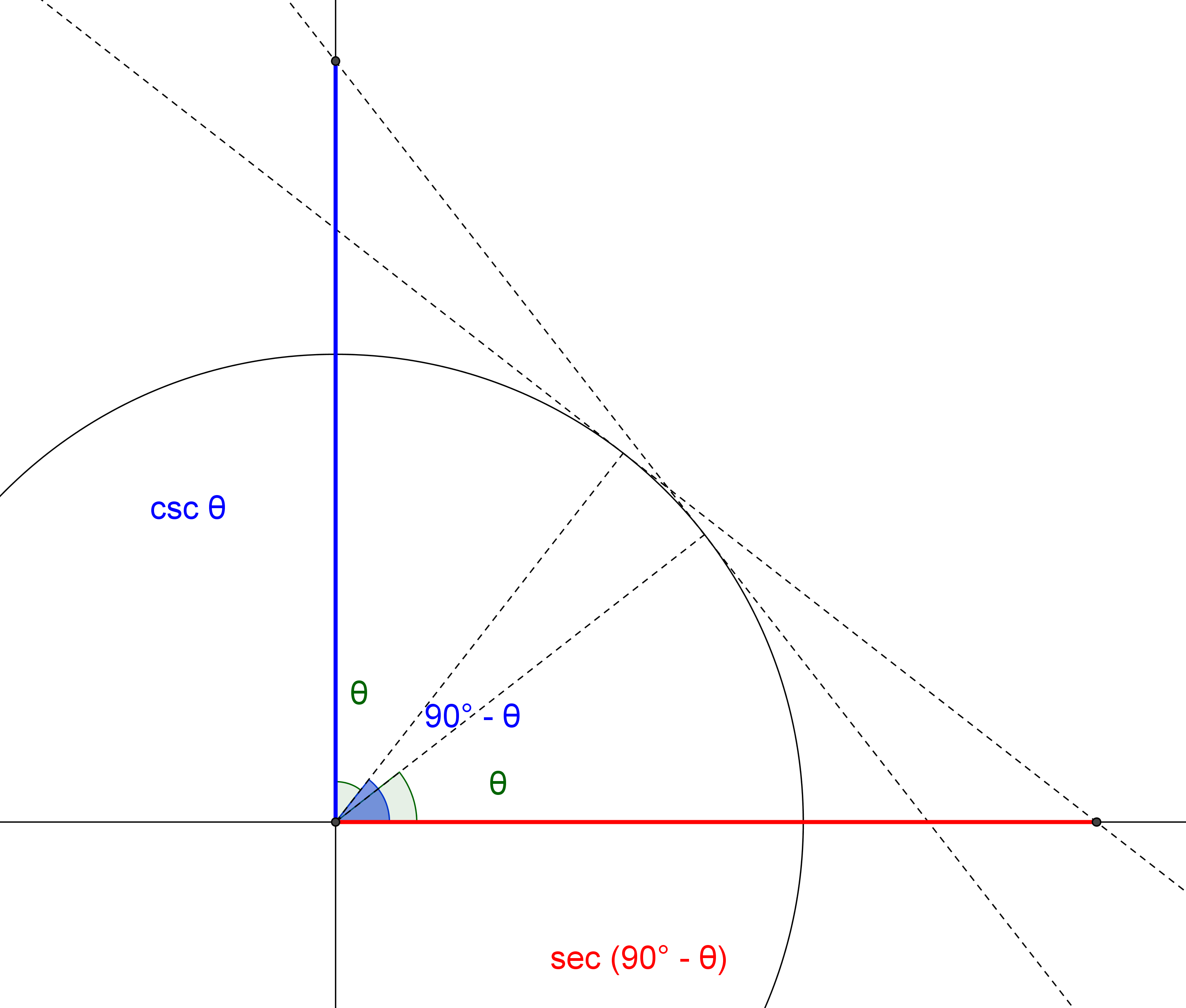 Descreve a relação de simetria entre cossecante de um ângulo e seu complementar